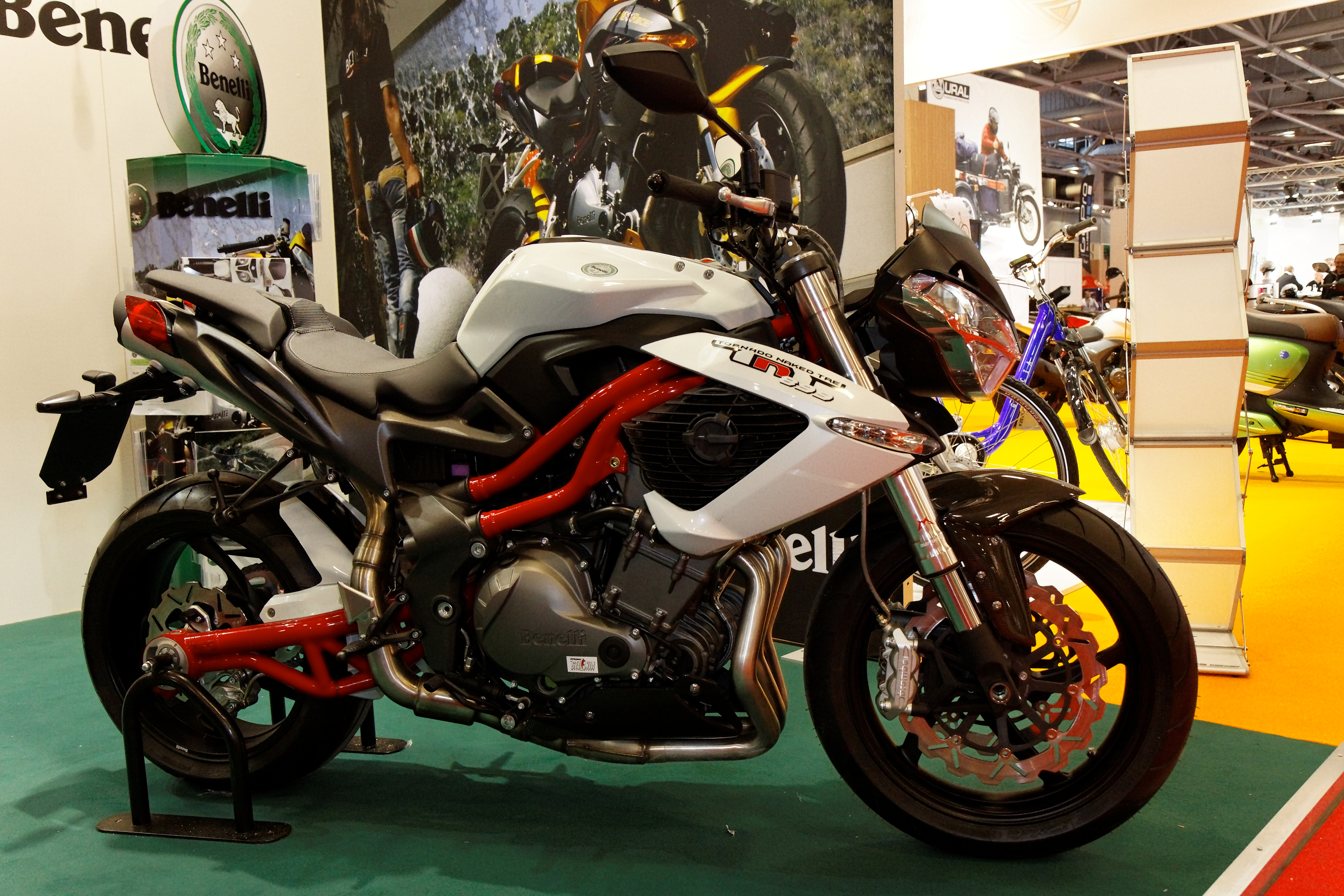 Benelli - TNT